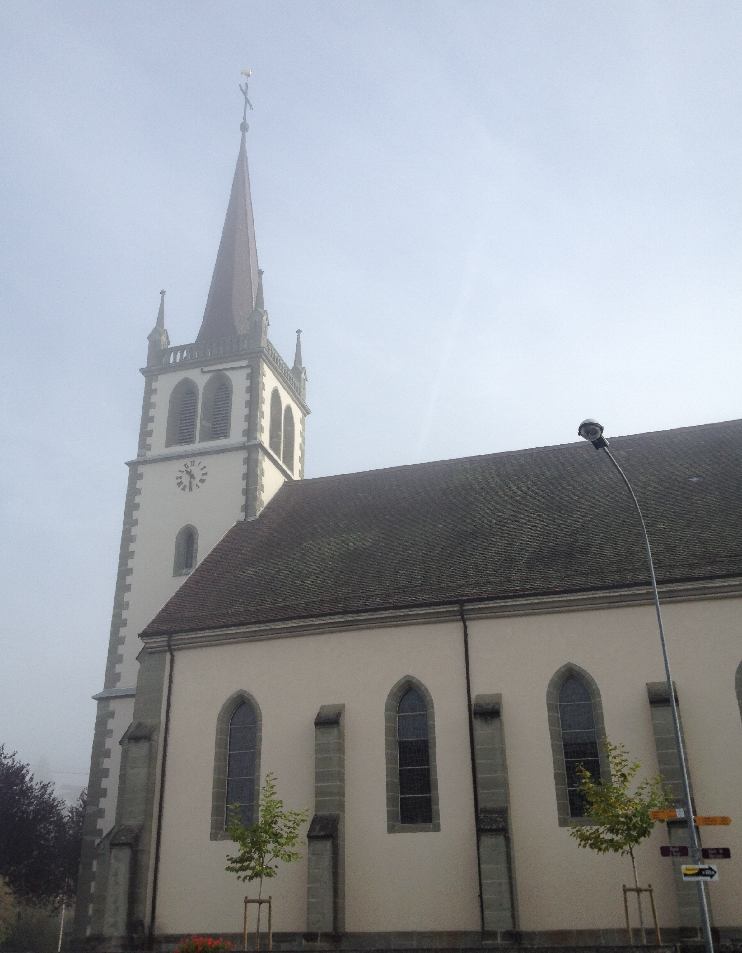 L'église Saint-Pierre-et-Paul à Promasens, en Suisse.